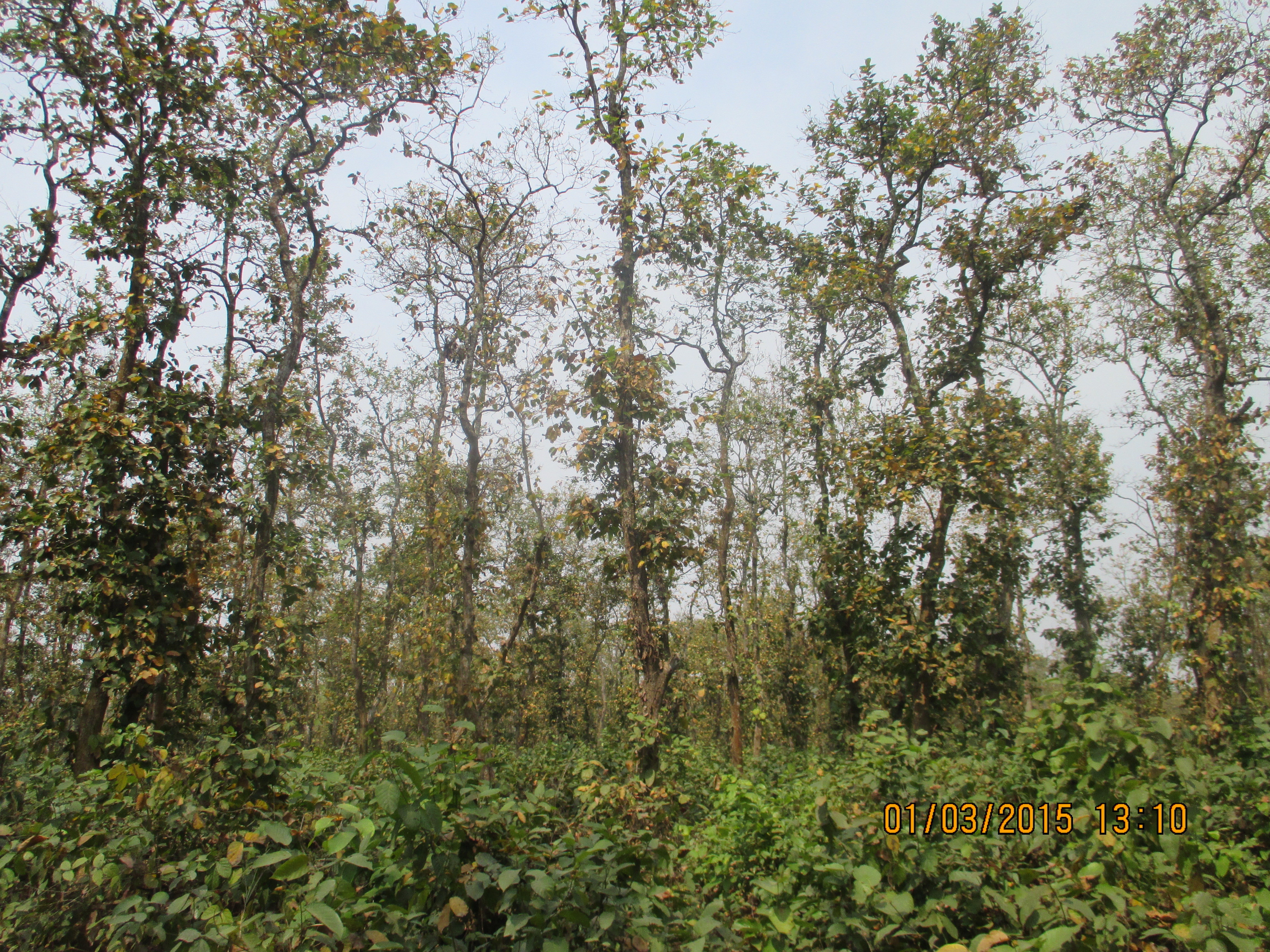 বাংলাদেশের জাতীয় উদ্যানগুলোর মধ্যে অন্যতম কাদিগড় জাতীয় উদ্যান। এটি ময়মনসিংহের ভালুকায় অবস্থিত।